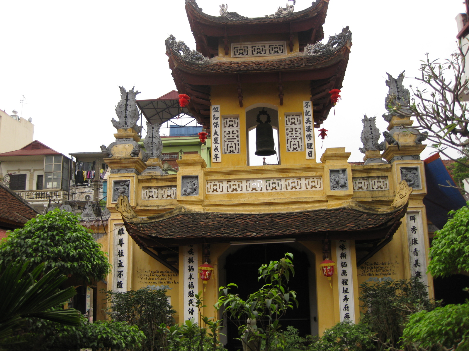 Chùa bà Ngô Hà Nội